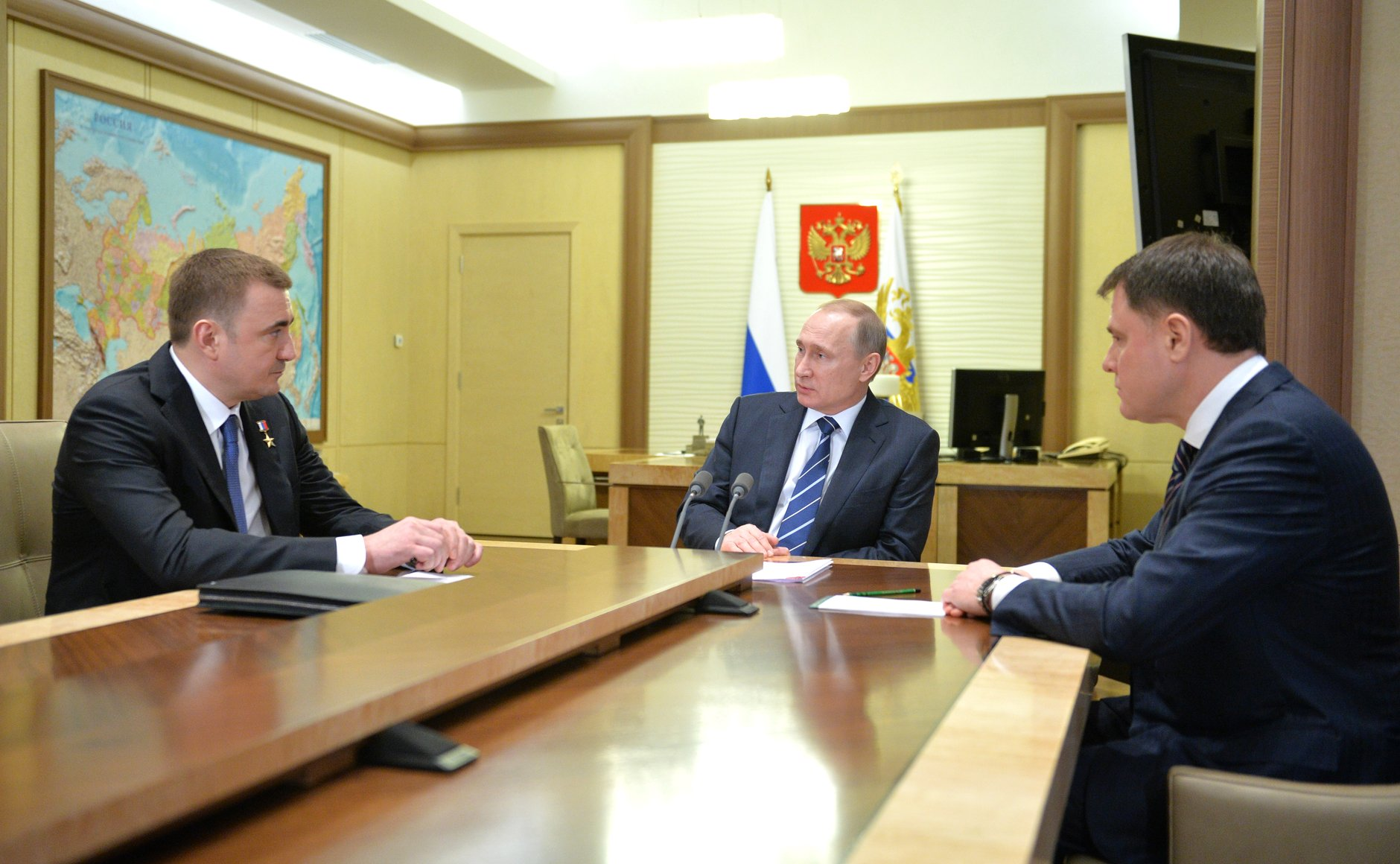 Встреча Президента России Владимира Путина с Владимиром Груздевым и Алексеем Дюминым